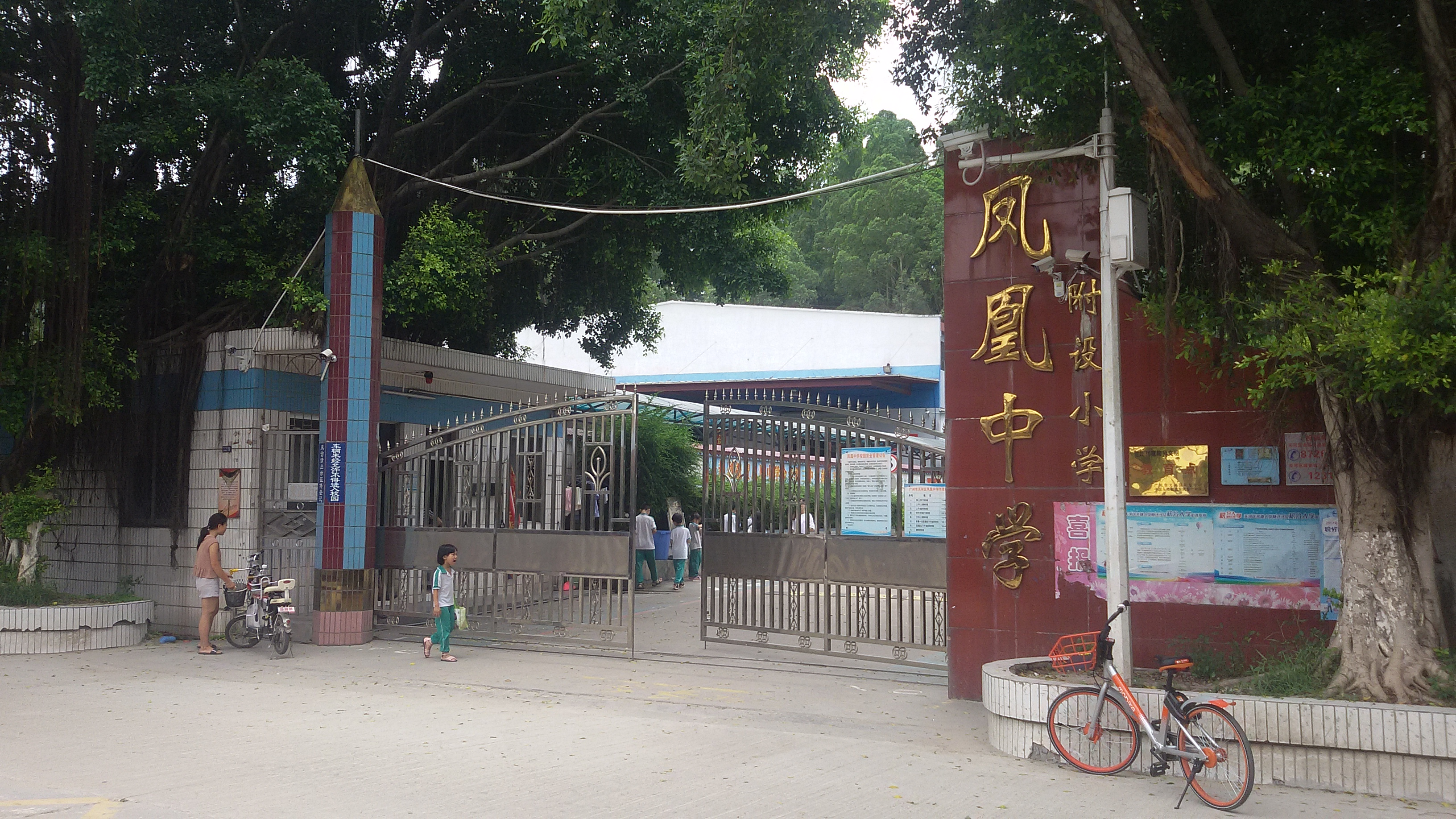 粵語: 天河区凤凰学校